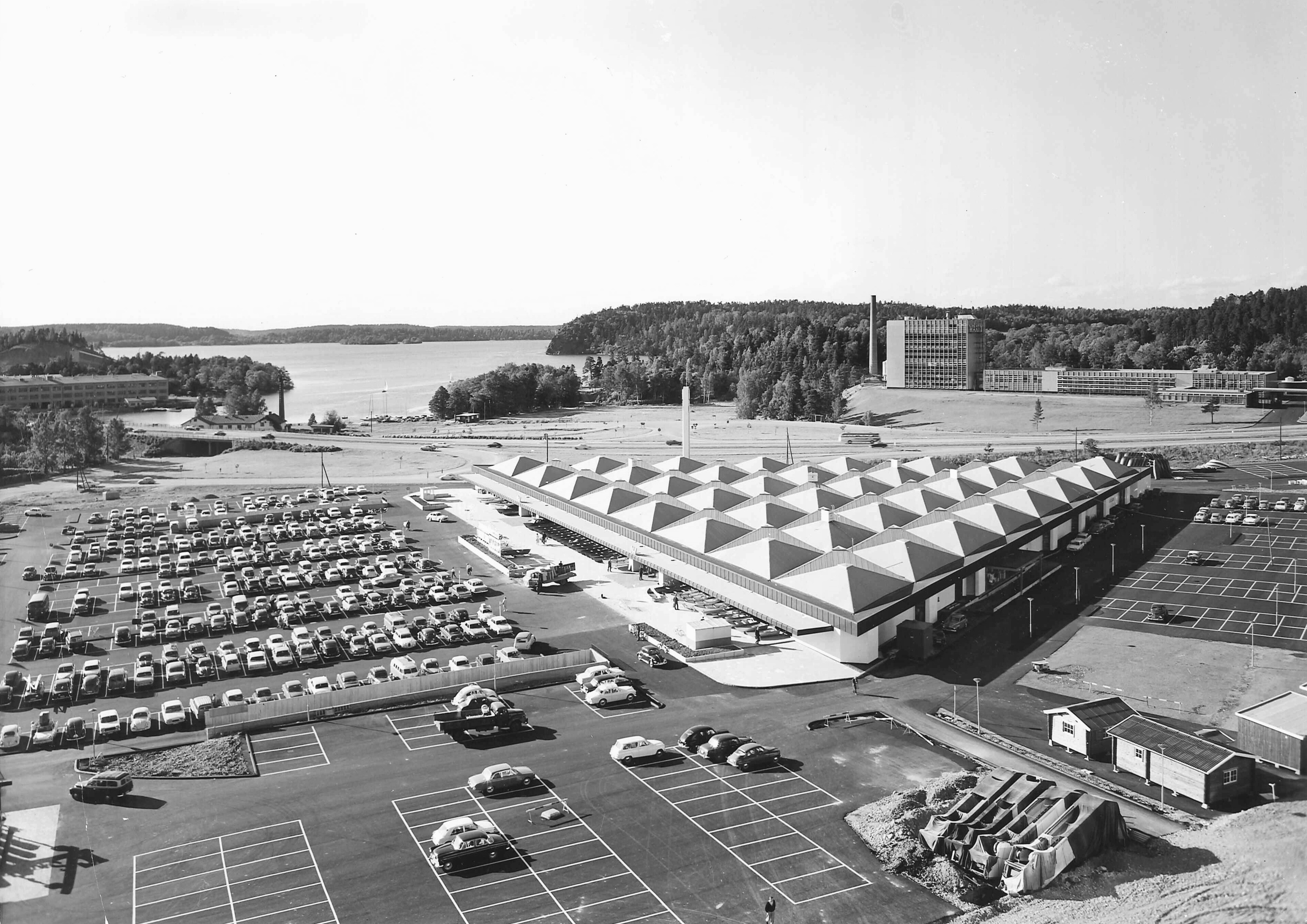 Obs! Stormarknad i Vårby med Wårby Bryggerier i bakgrunden